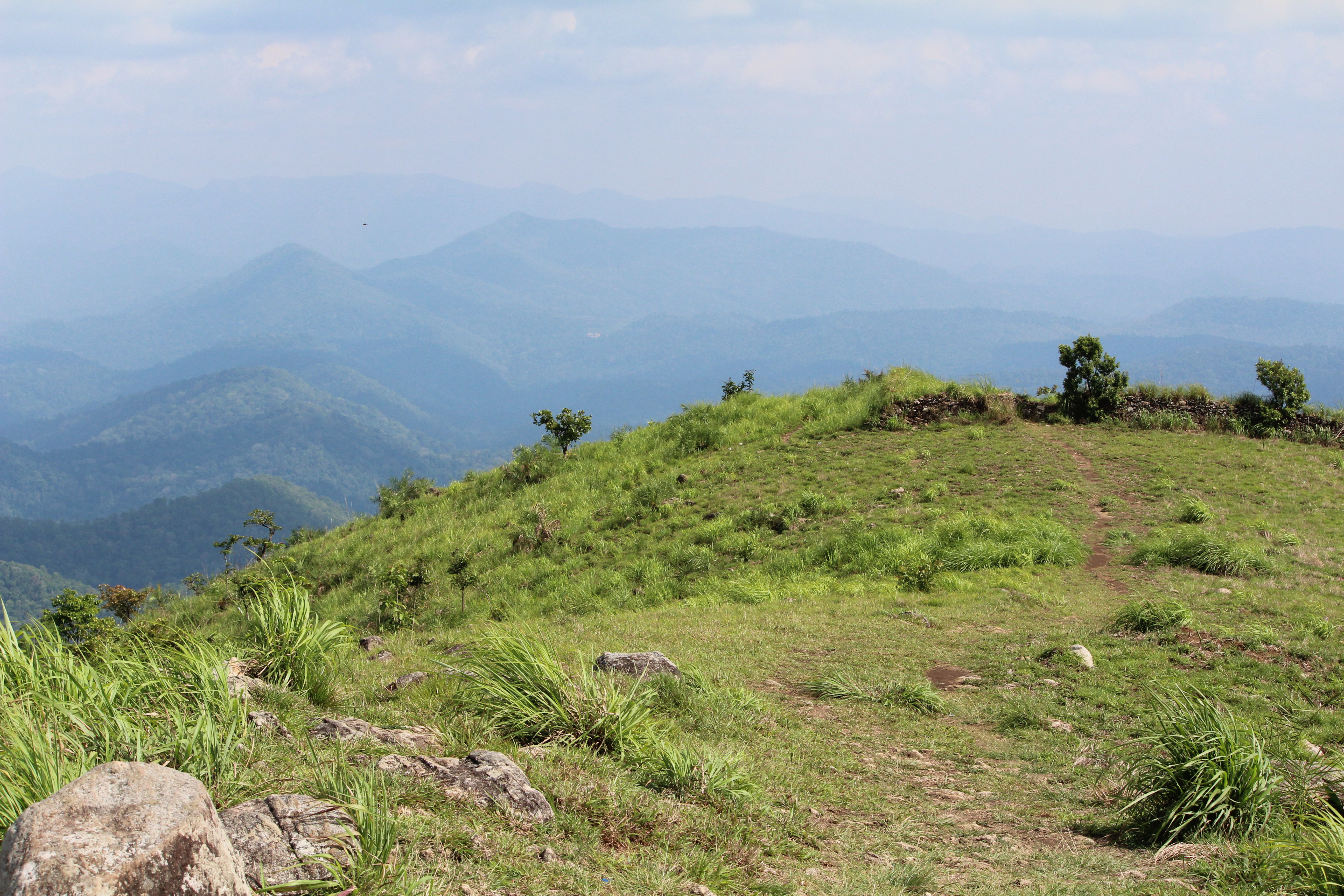 പാഞ്ചാലിമേട്ടിൽ നിന്നുള്ള കാഴ്ച